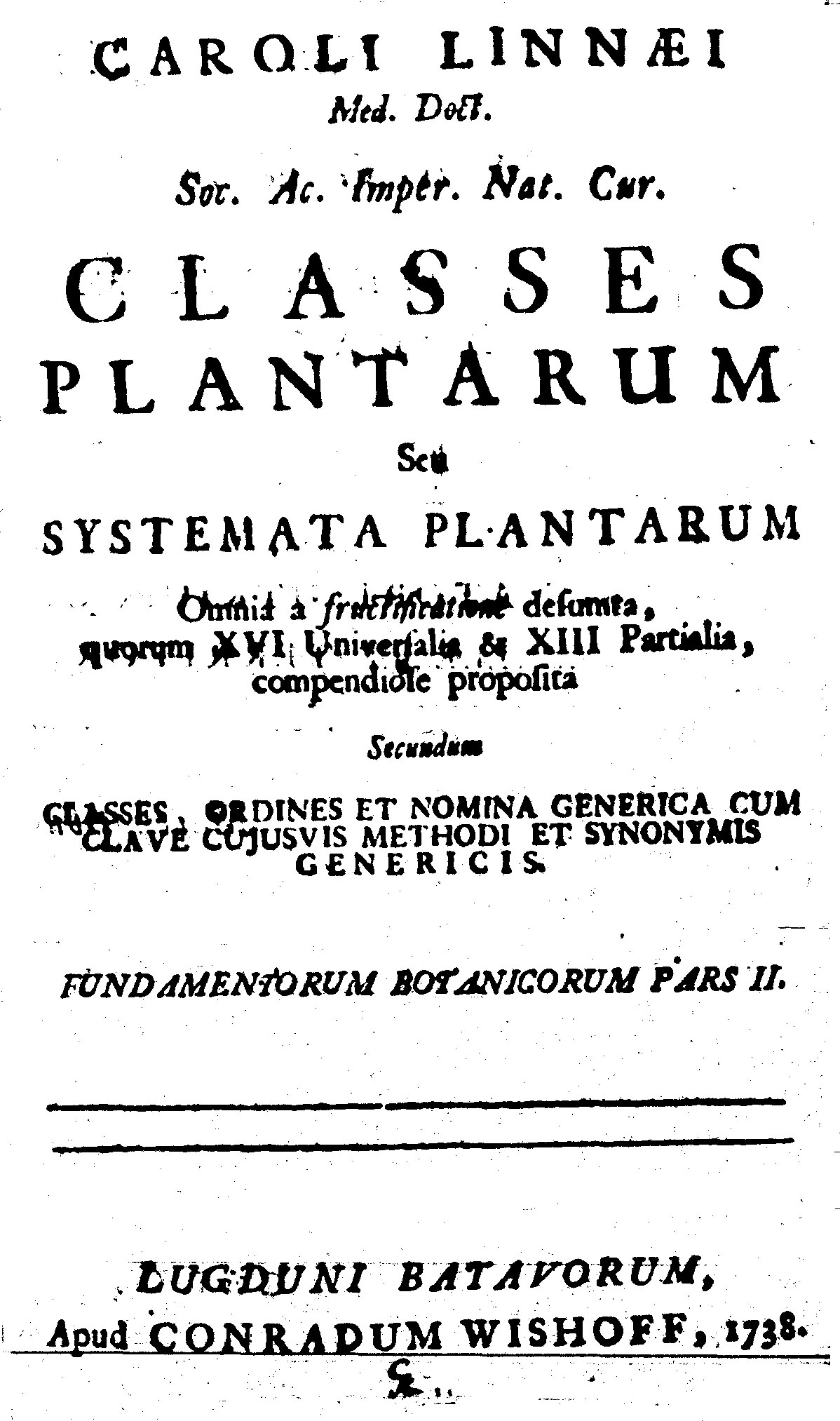 Titelblatt von Carl von Linnés Classes Plantarum, 1. Auflage, 1738